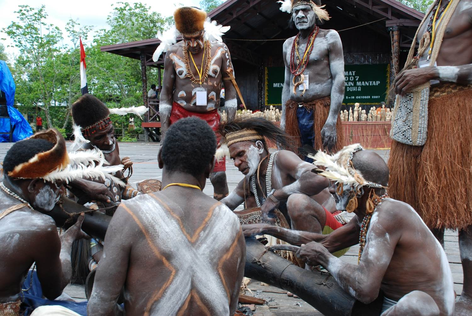 The Asmat of Papua rely on the abundant trees around them for elaborate wood carving tradition. USAID works with stakeholders to conserve the Mimika Mangroves in Asmat by integrating forest conservation with Low Emissions Development on other, already degraded land. Orang Asmat di Papua mengandalkan pohon untuk mempertahankan tradisi mengukir kayu yang sangat indah. USAID bekerjasama dengan pemangku kepentingan setempat mengintegrasikan pelestarian hutan dan pembangunan rendah emisi di lahan kritis di Mimika.